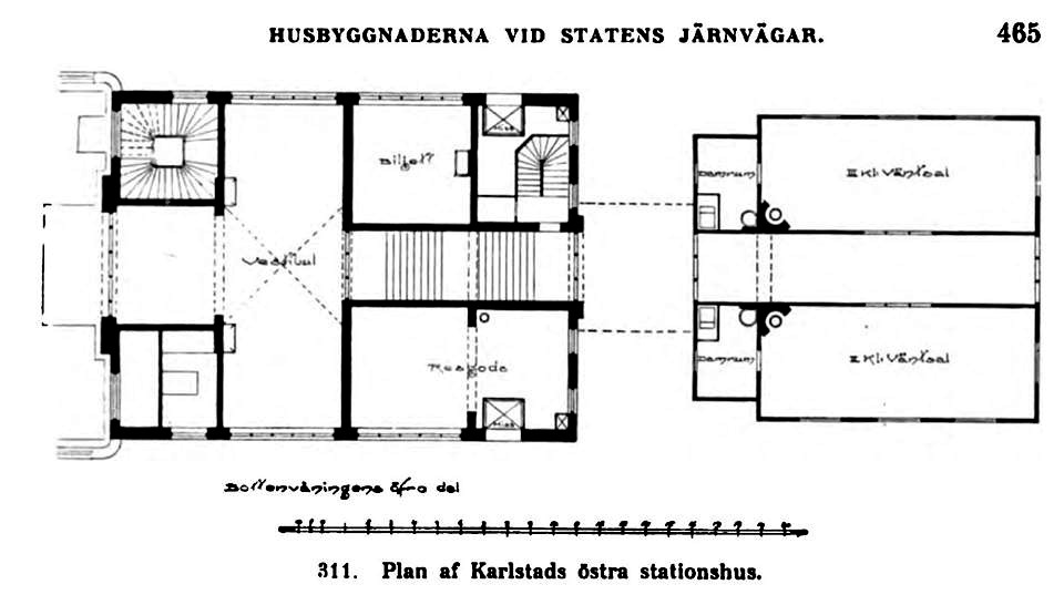 Skiss över Karlstad Östras bottenvånings övre del